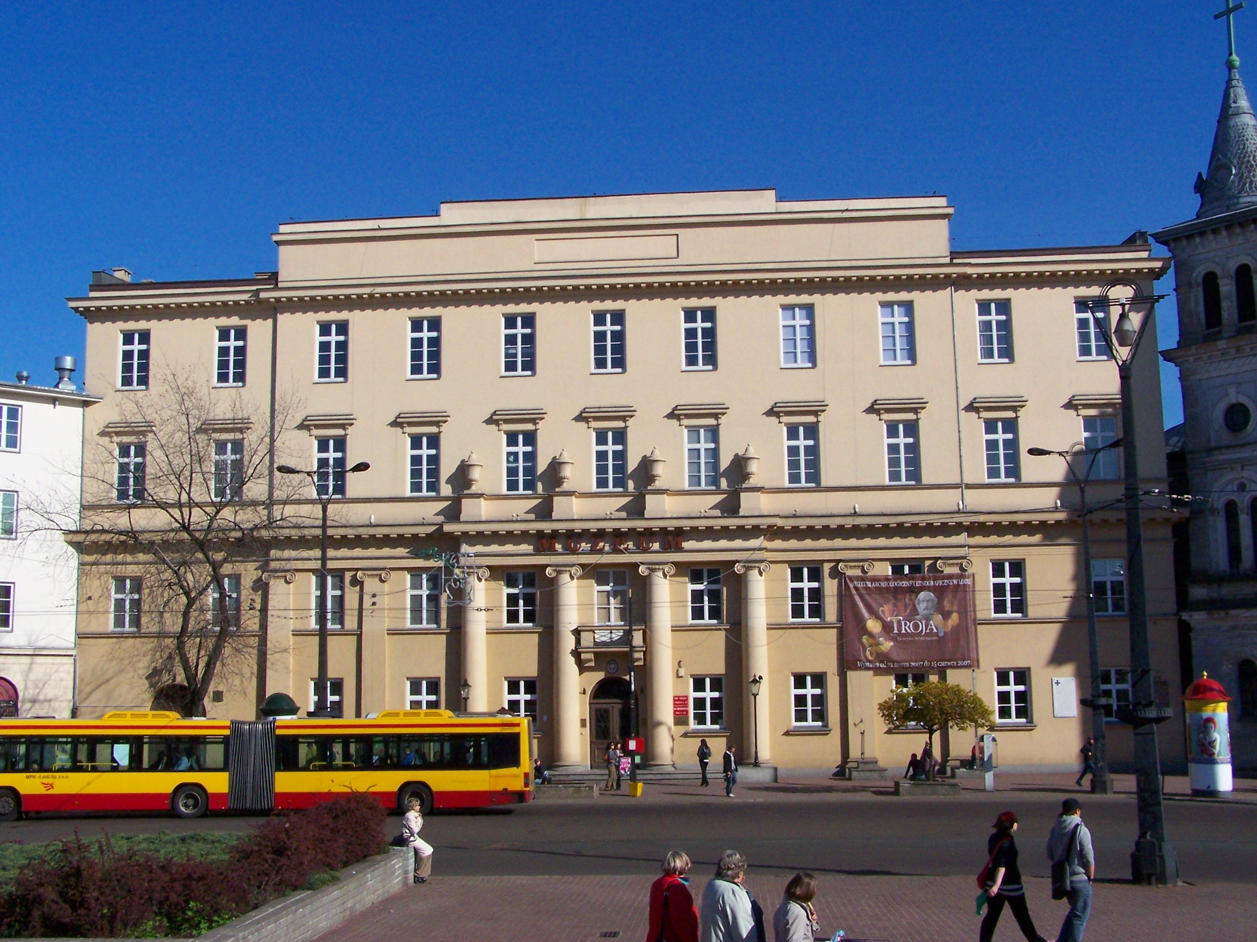 Muzeum Archeologiczno-Etnograficzne w Łodzi.